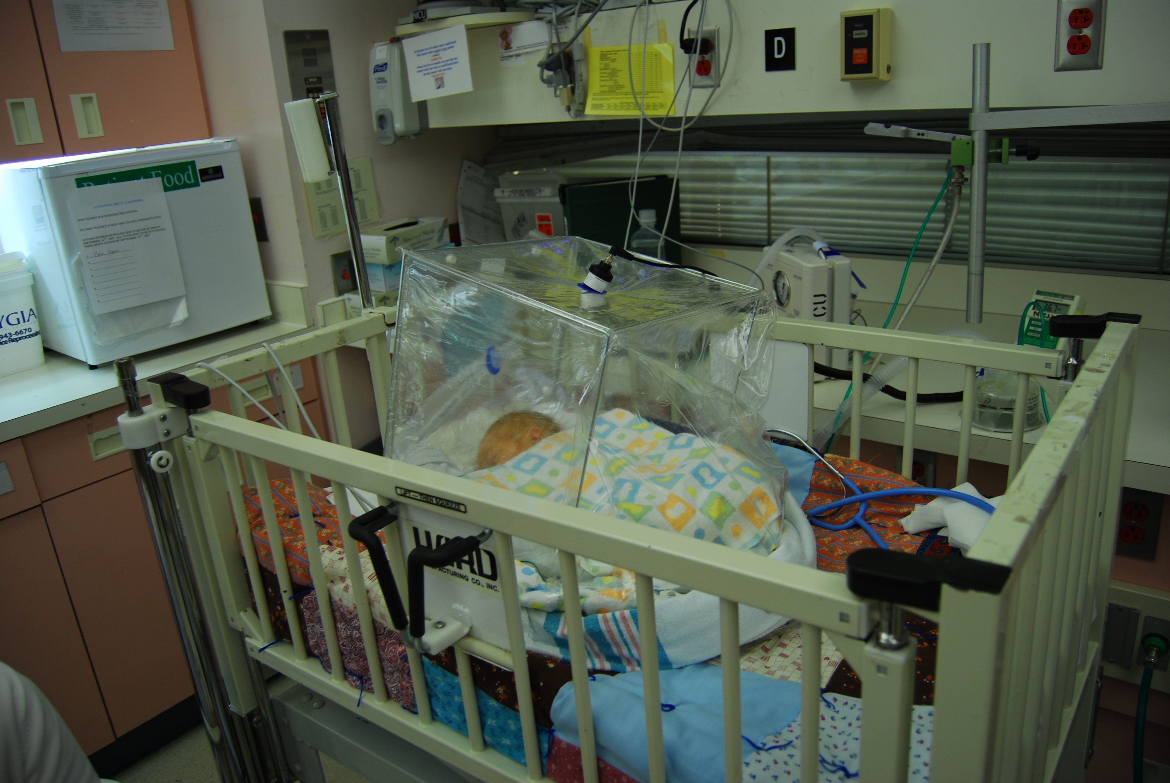 Oxygen tent